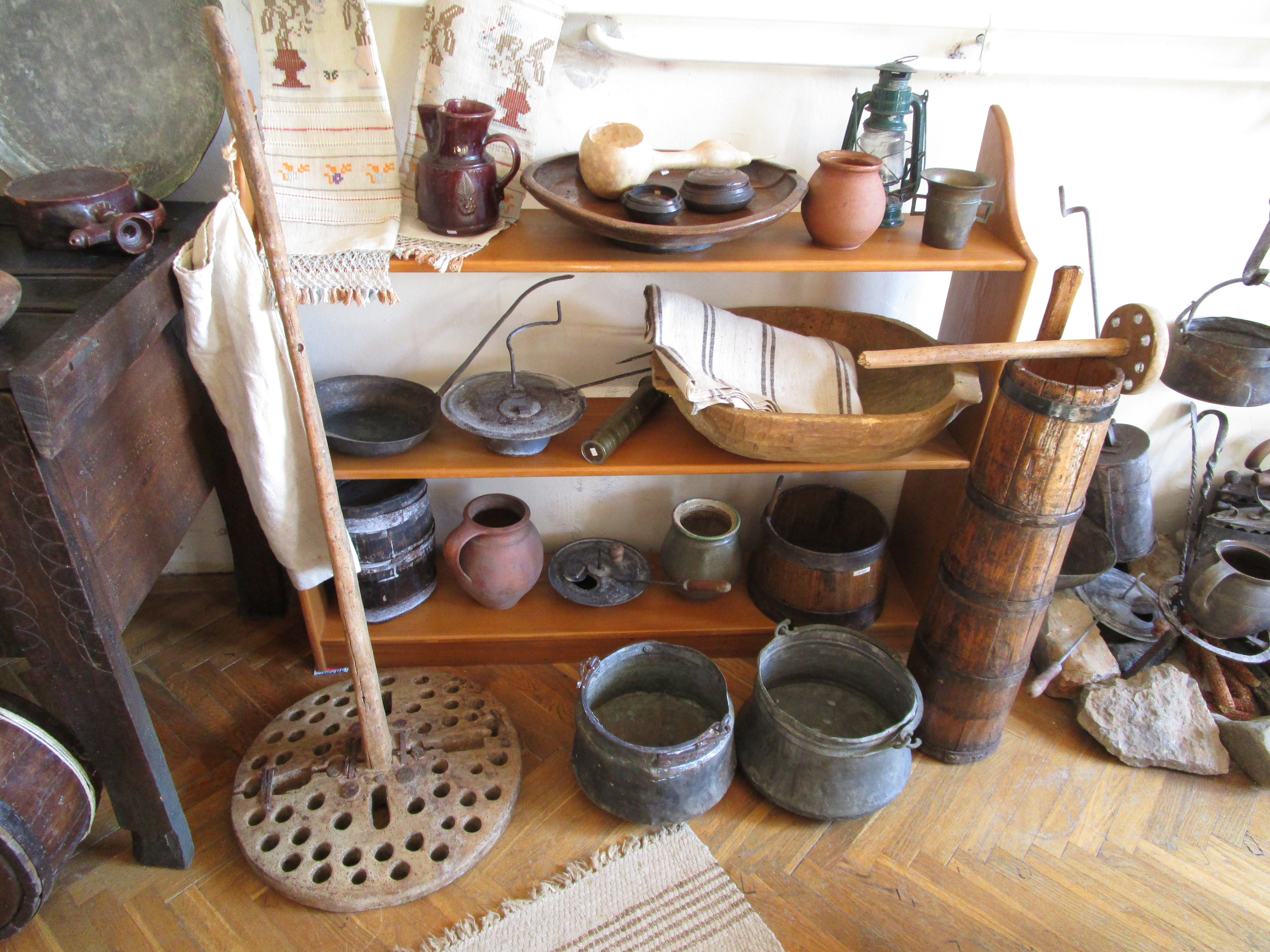 Српски (ћирилица): Завичајна музејска збирка у Димитровграду